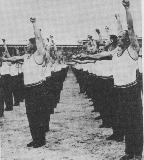 Česky: X. všesokolský slet